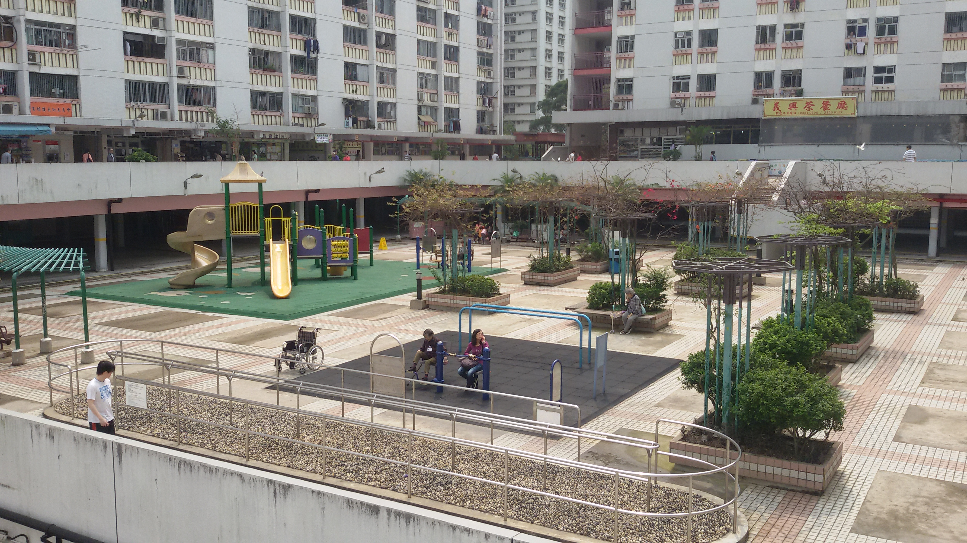 中文（香港）: 富山邨公園